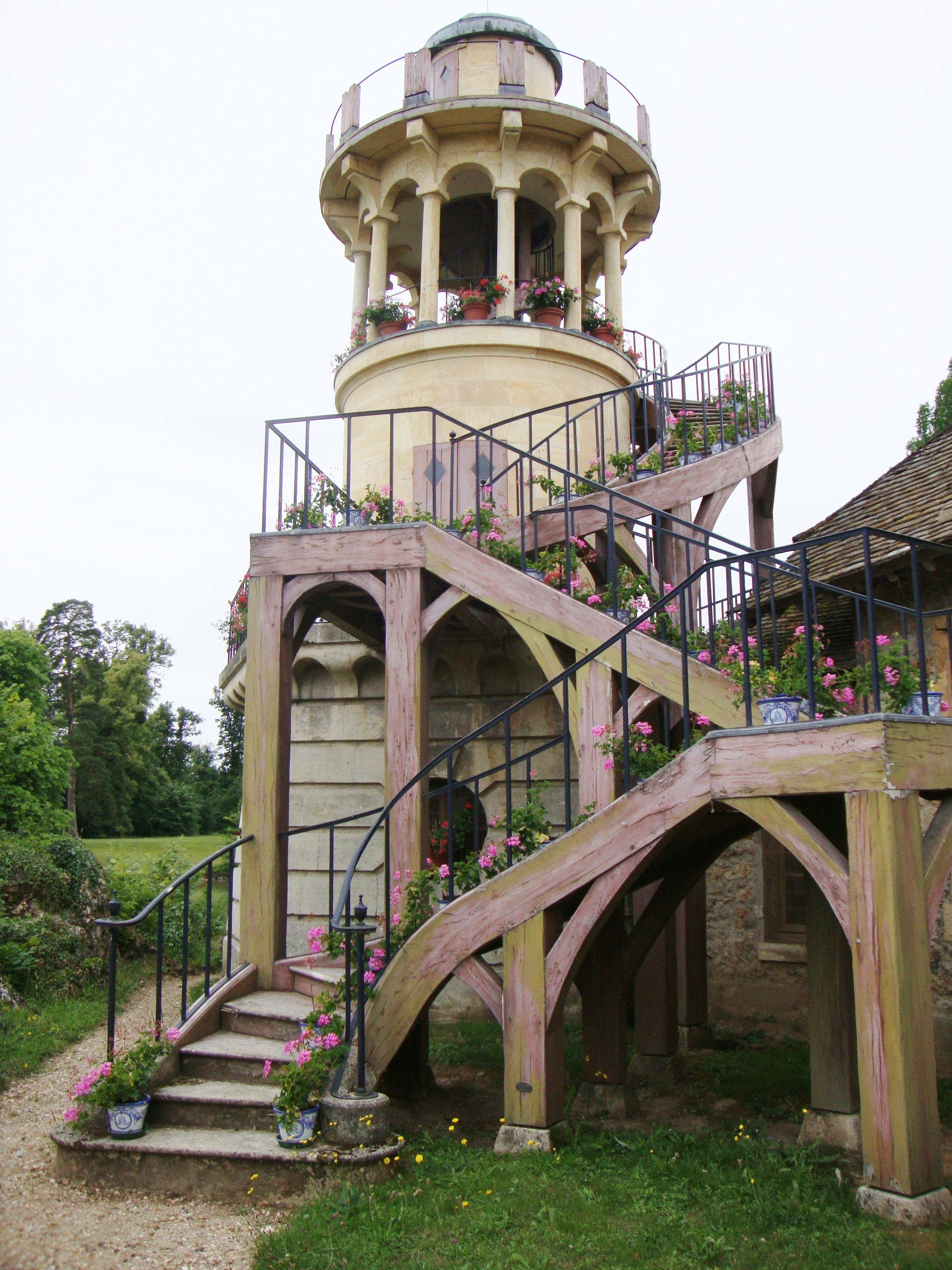 Tour de Marlborough - Hameau de la Reine